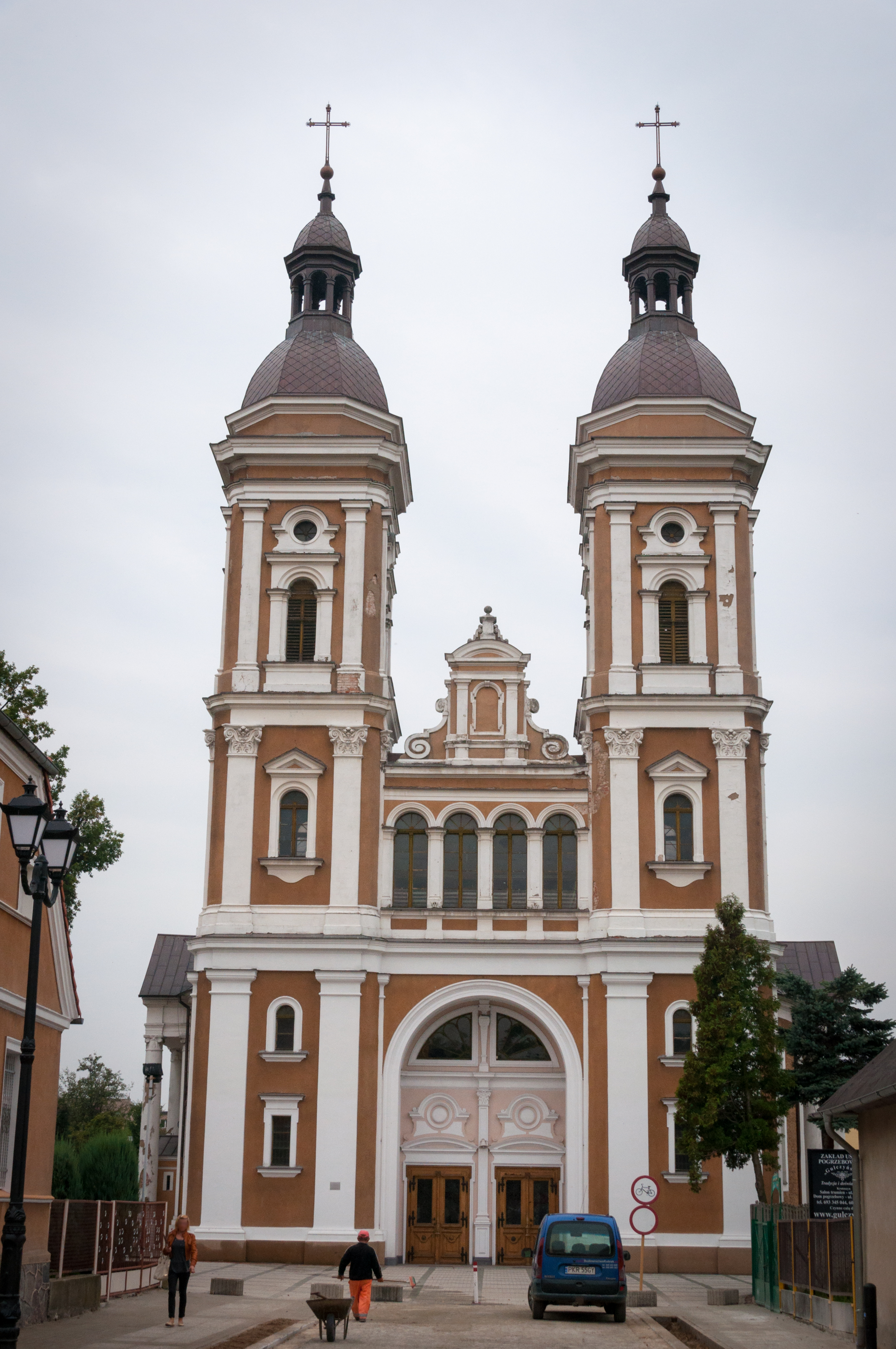 Krotoszyn, kościół ewangelicki, ob. rzym.-kat. p.w. św. Andrzeja Boboli, 1788, 1884